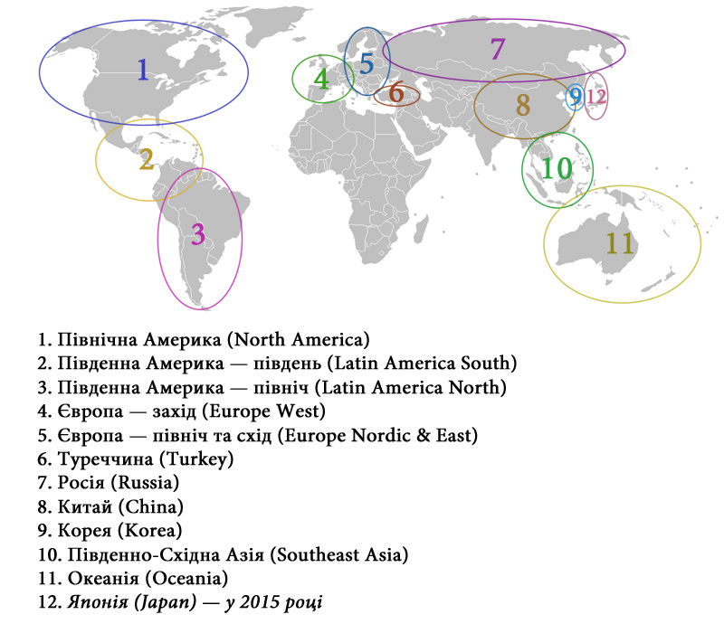 Світова мапа серверів/регіонів League of Legends